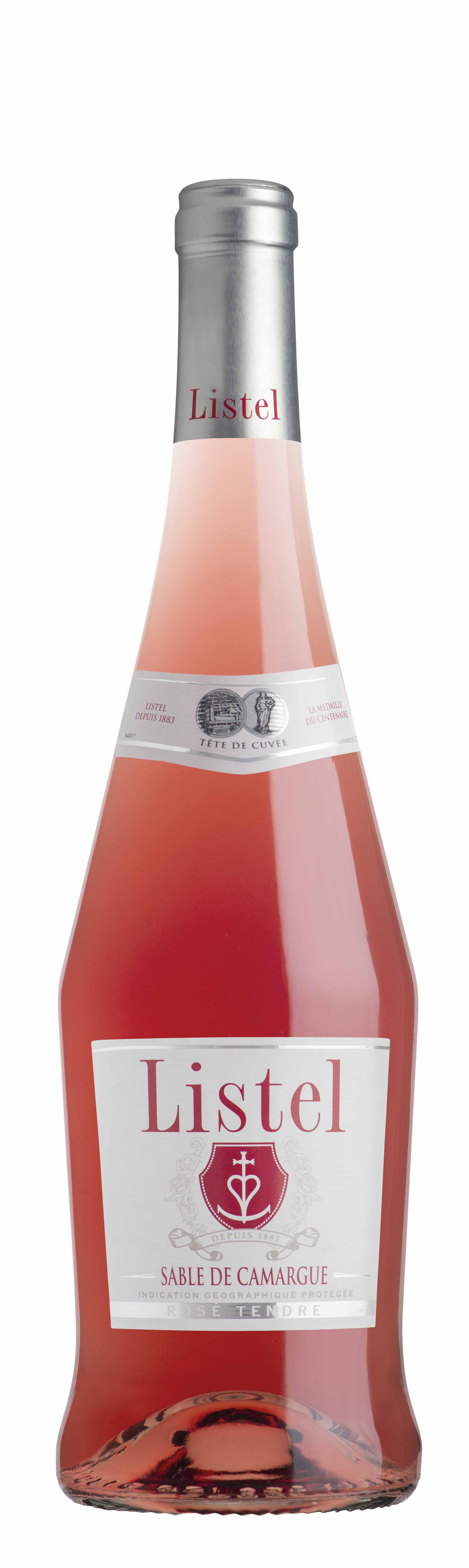 Listel rosé tendre